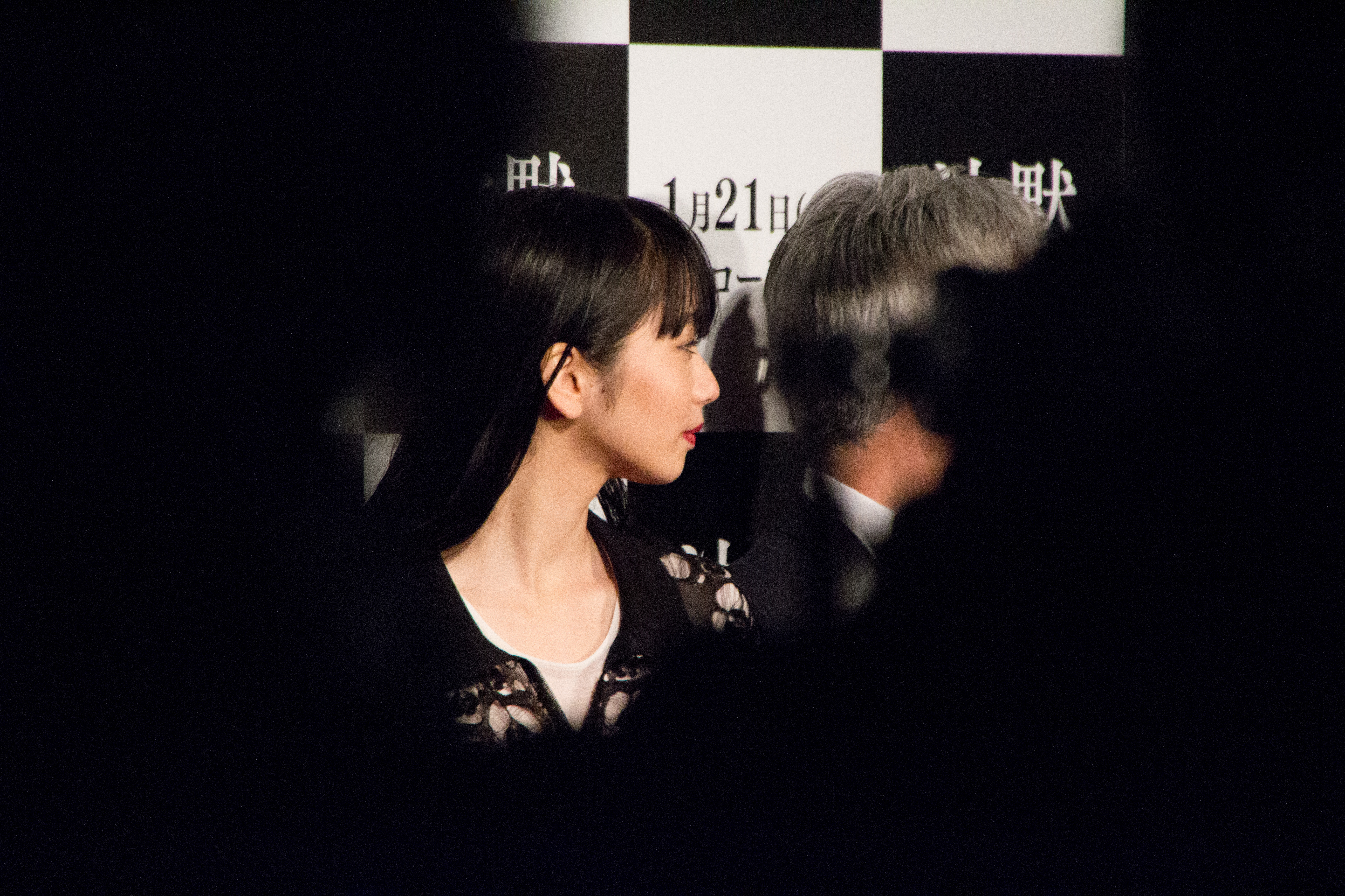 沈黙 ジャパンプレミア 小松菜奈